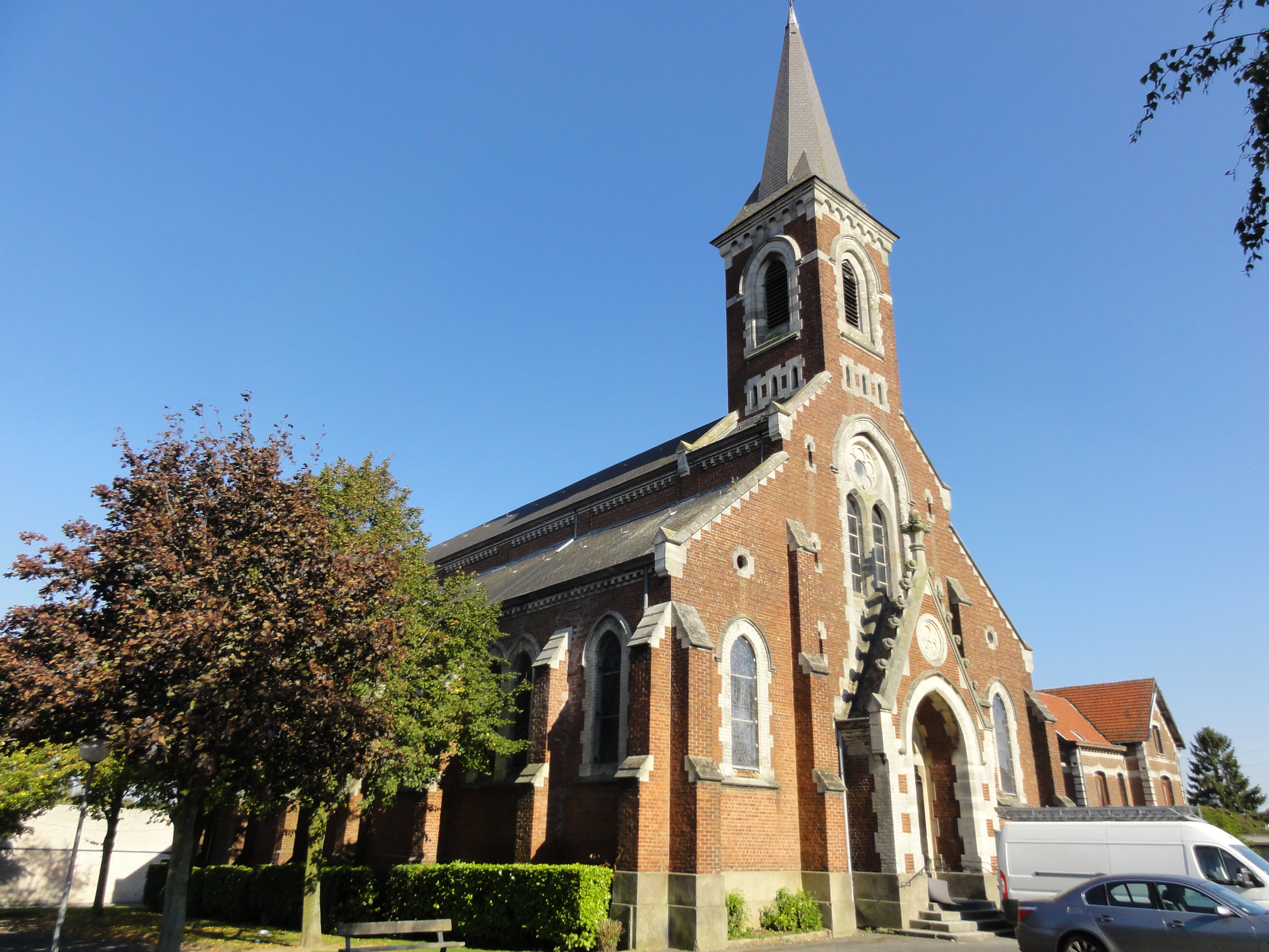 Église Saint-Joseph des cités de la fosse n° 6 - 6 bis - 6 ter de la Compagnie des mines de Bruay, Bruay-la-Buissière, Pas-de-Calais, Nord-Pas-de-Calais, France.